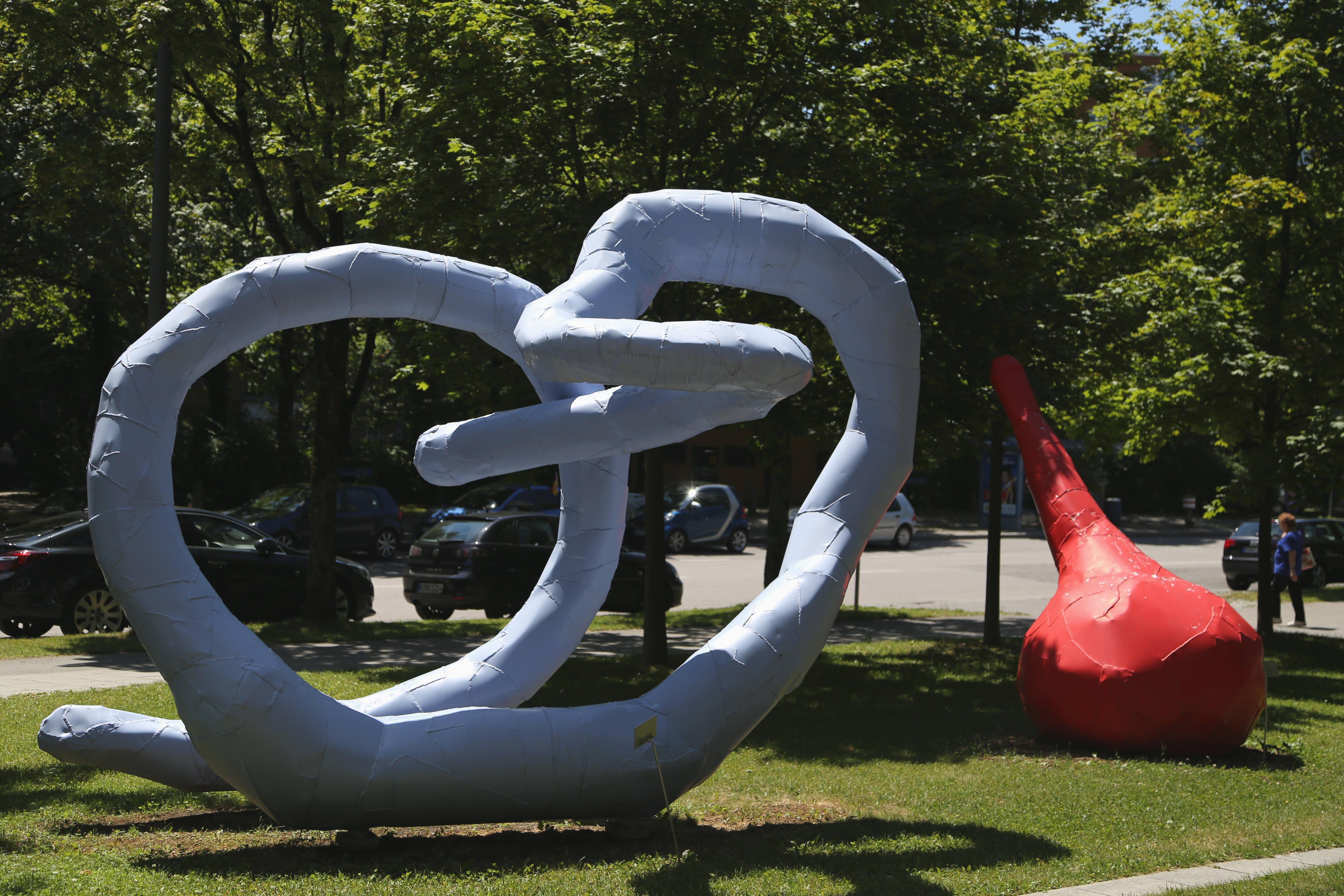 Franz West: Generally, 2007, Adenauerring 11, Neuperlach, München Franz West (1947–2012) DescriptionAustrian artist, sculptor and visual artistDate of birth/death16 February 194726 July 2012Location of birth/deathViennaViennaAuthority control VIAF: 96132180 ISNI: 0000 0000 8168 4344 ULAN: 500065606 LCCN: nr95017294 GND: 119193744 WorldCat